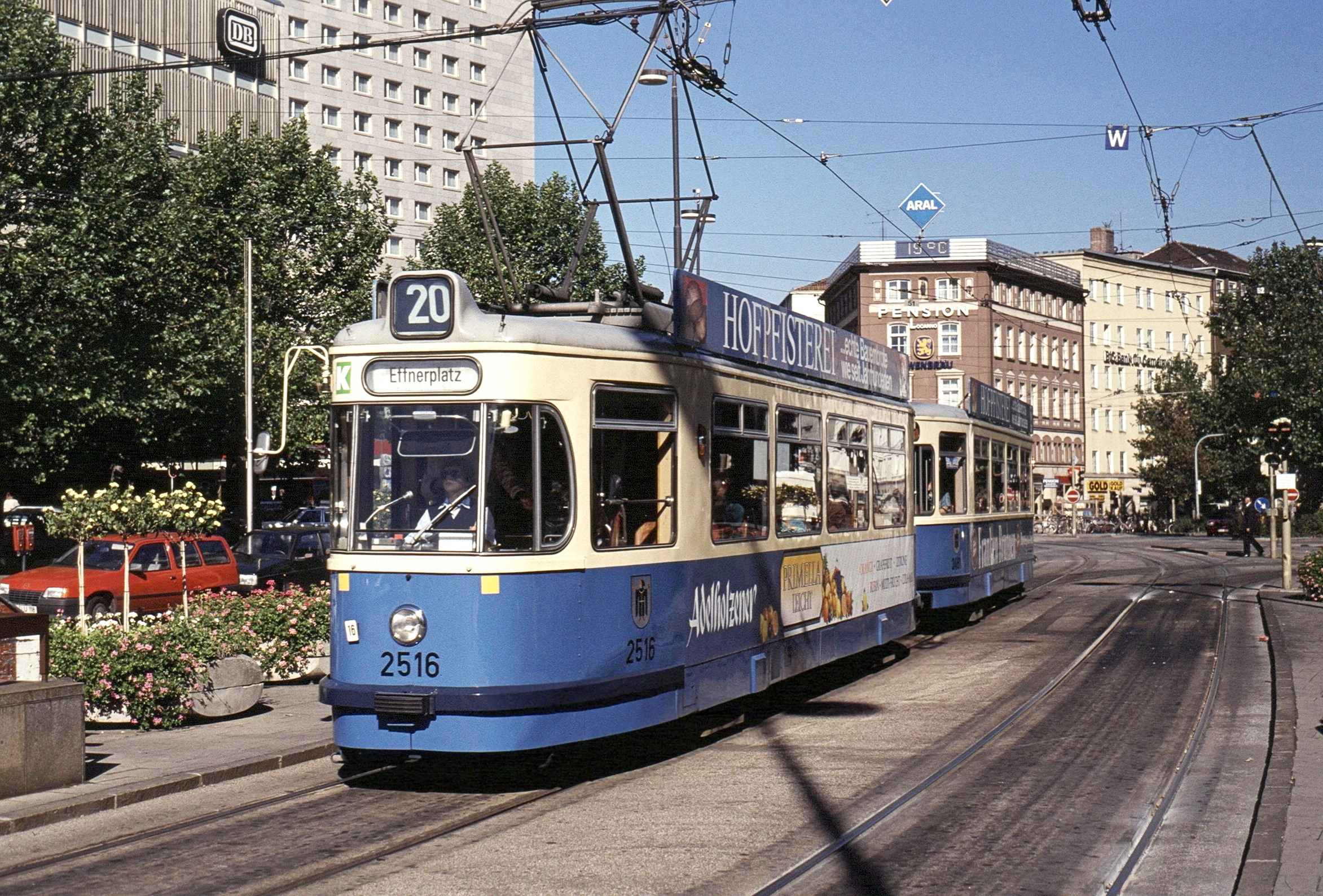 Straßenbahnwagen Baureihe M in München